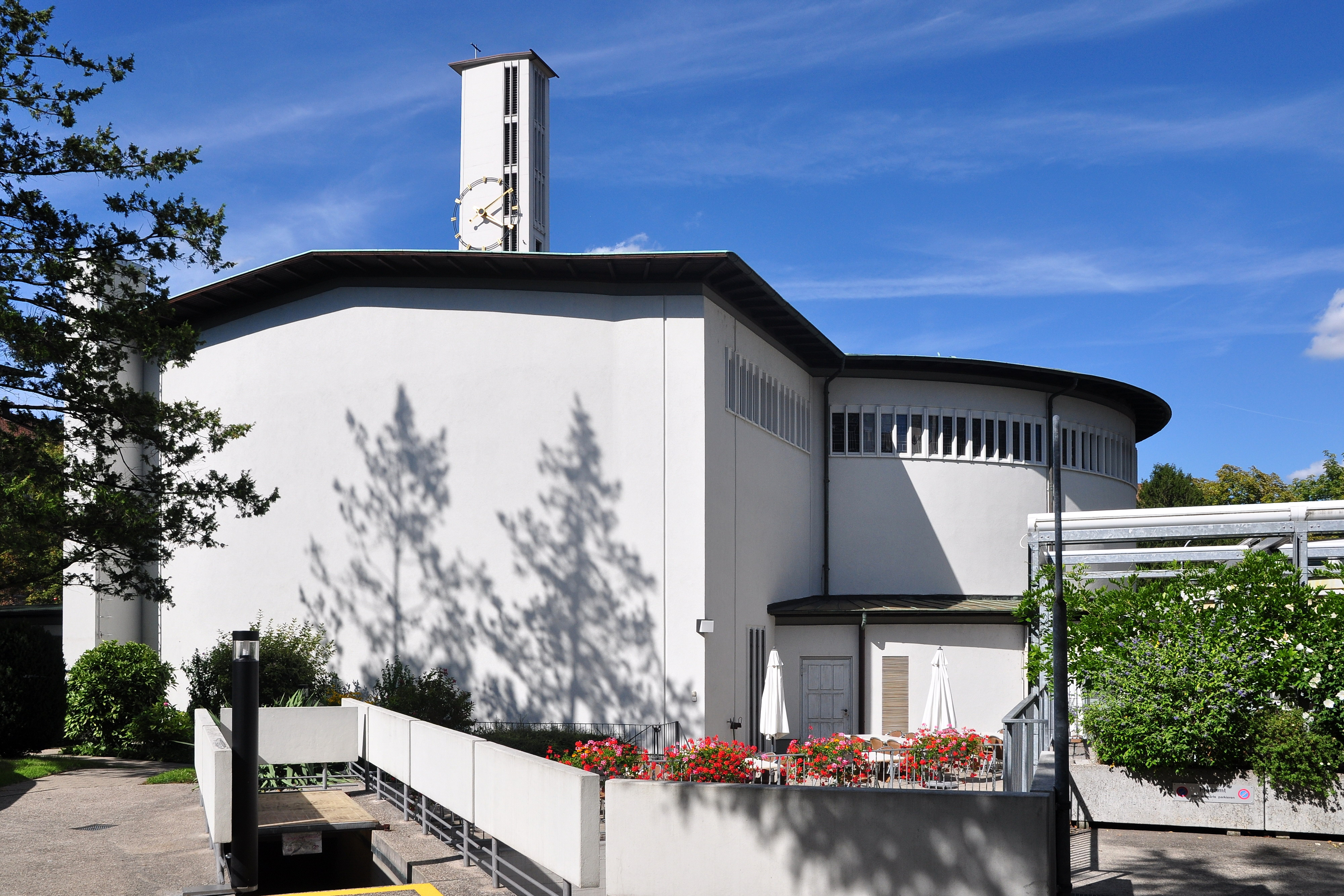 Katholische Kirche Felix und Regula in Zürich-Hard (Switzerland)